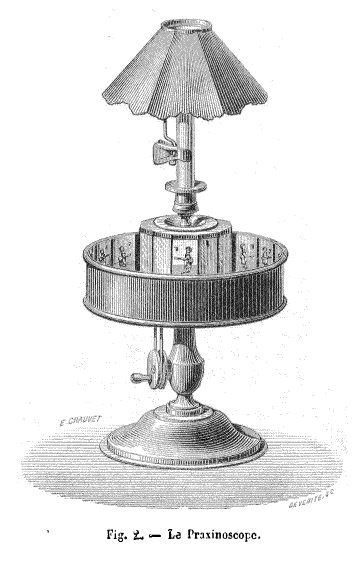 Le praxinoscope d'Émile Reynaud pour La Nature, revue des sciences - 1879, n° 296, page 133.